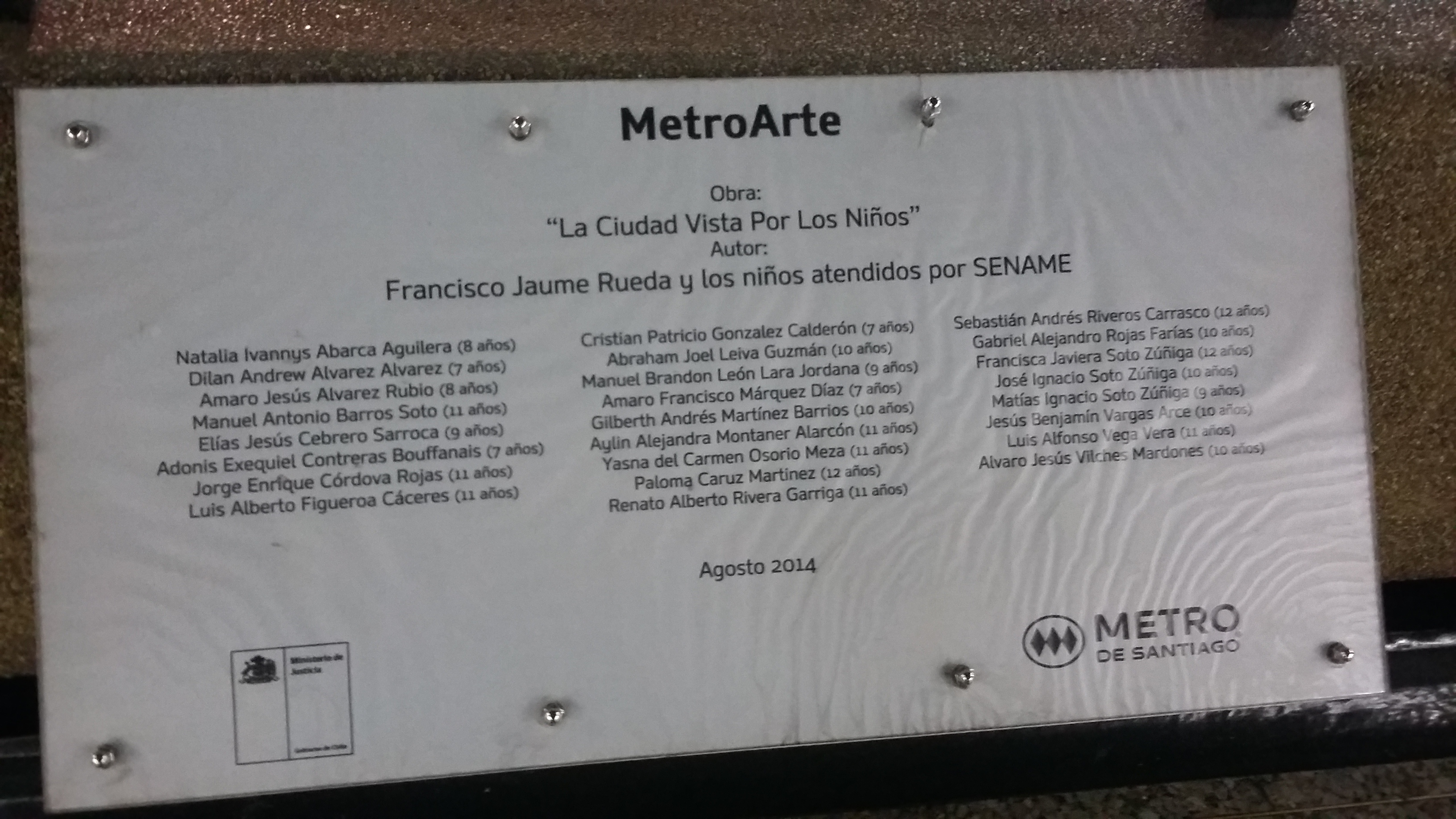 Placa conmemorativa agosto de 2014 en esta ocacion nombrando a los niños participantes